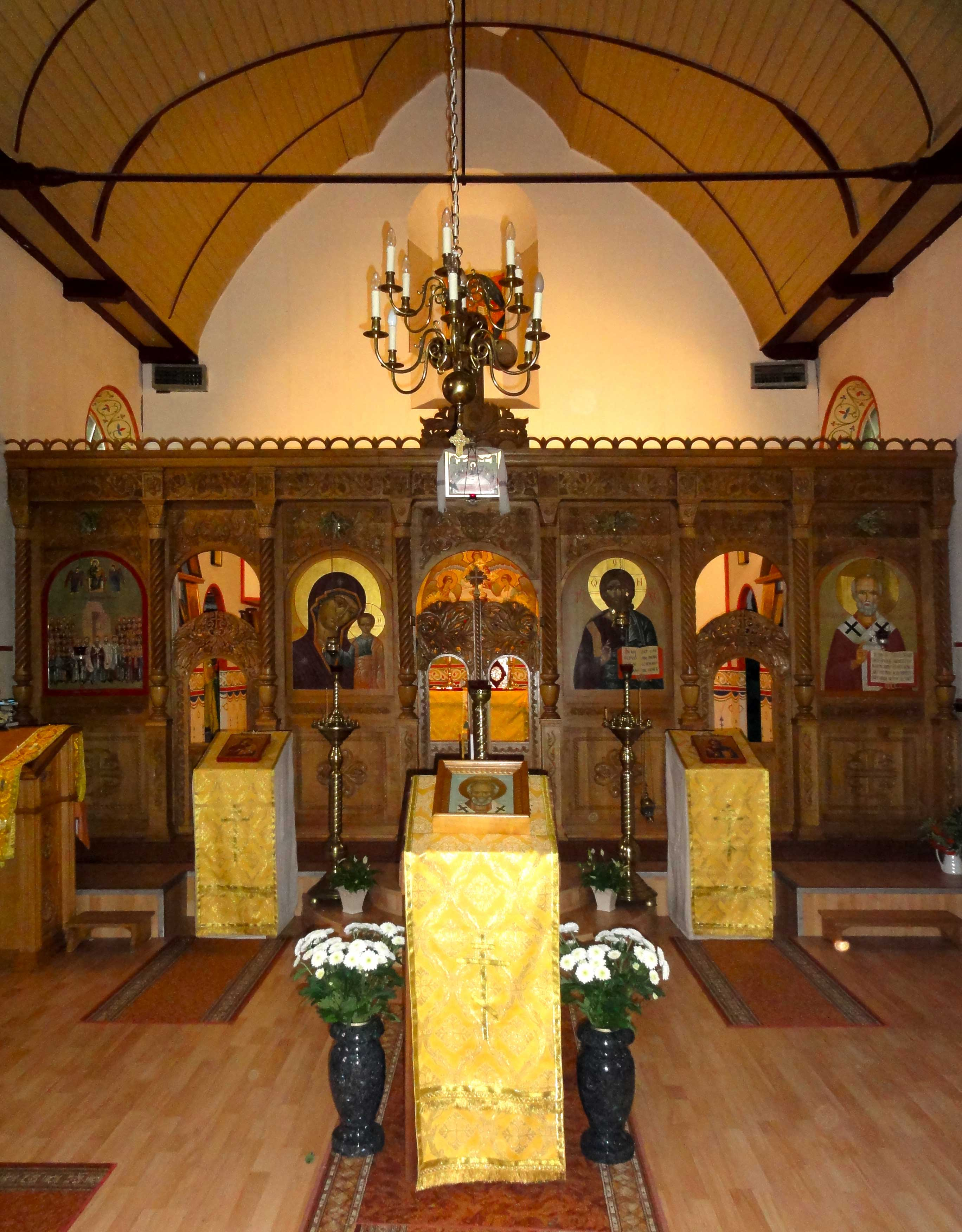 Het Russisch-orthodoxe klooster van de Heilige Nicolaas van Myra te Hemelum (interieur)